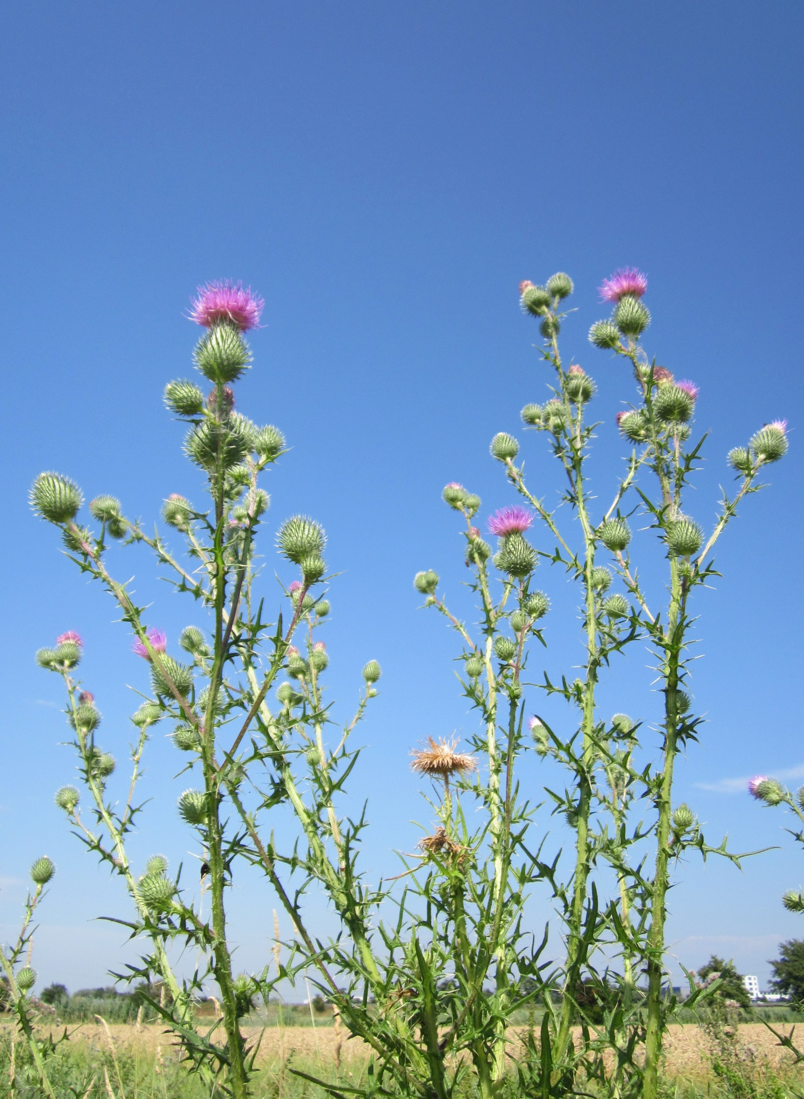 Gewöhnliche Kratzdistel (Cirsium vulgare) im Hockenheimer Rheinbogen